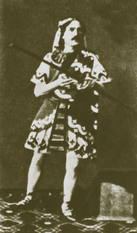 Marius Petipa (1818-1910) in La Fille du Pharaon